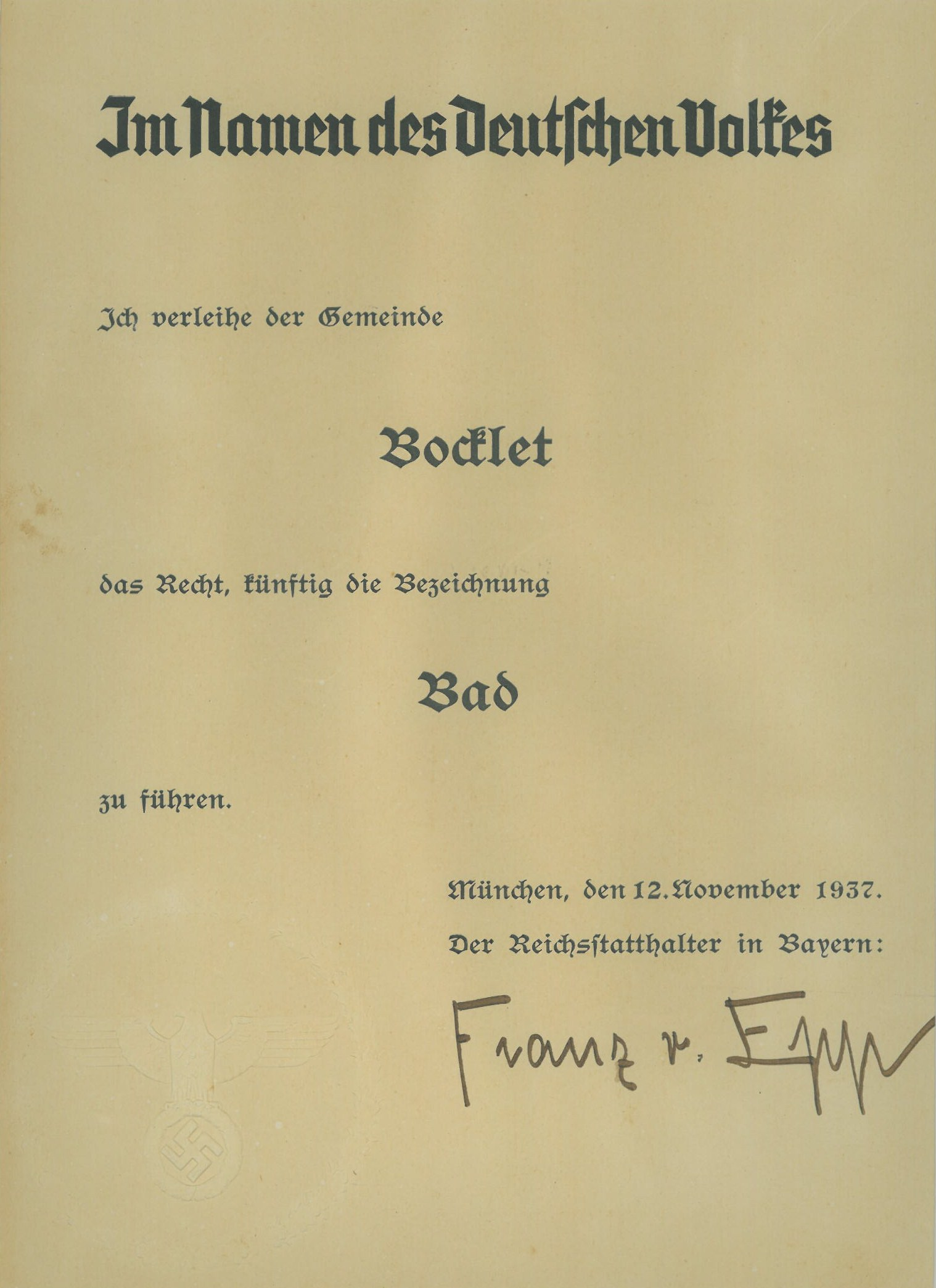 Urkunde vom 12. November 1937, mit der Reichsstatthalter Franz Ritter von Epp den Kurort Bad Bocklet zum "Bad" erhob